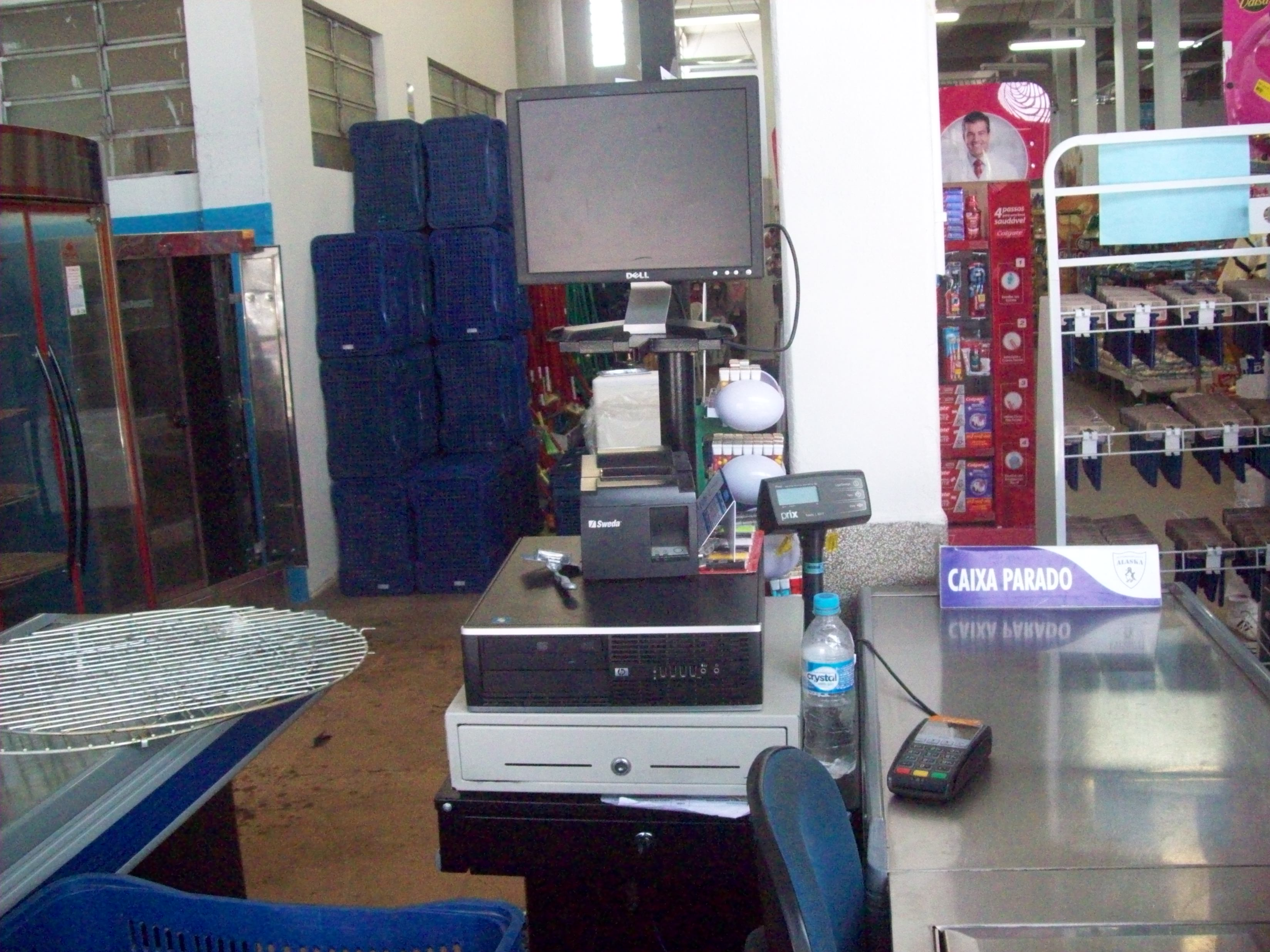 atuais caixa registadora como Supermercados, Lojas, Shopping Center e outros como em Machado (MG).